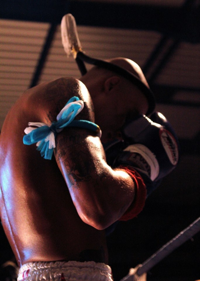 Samy avant un combat